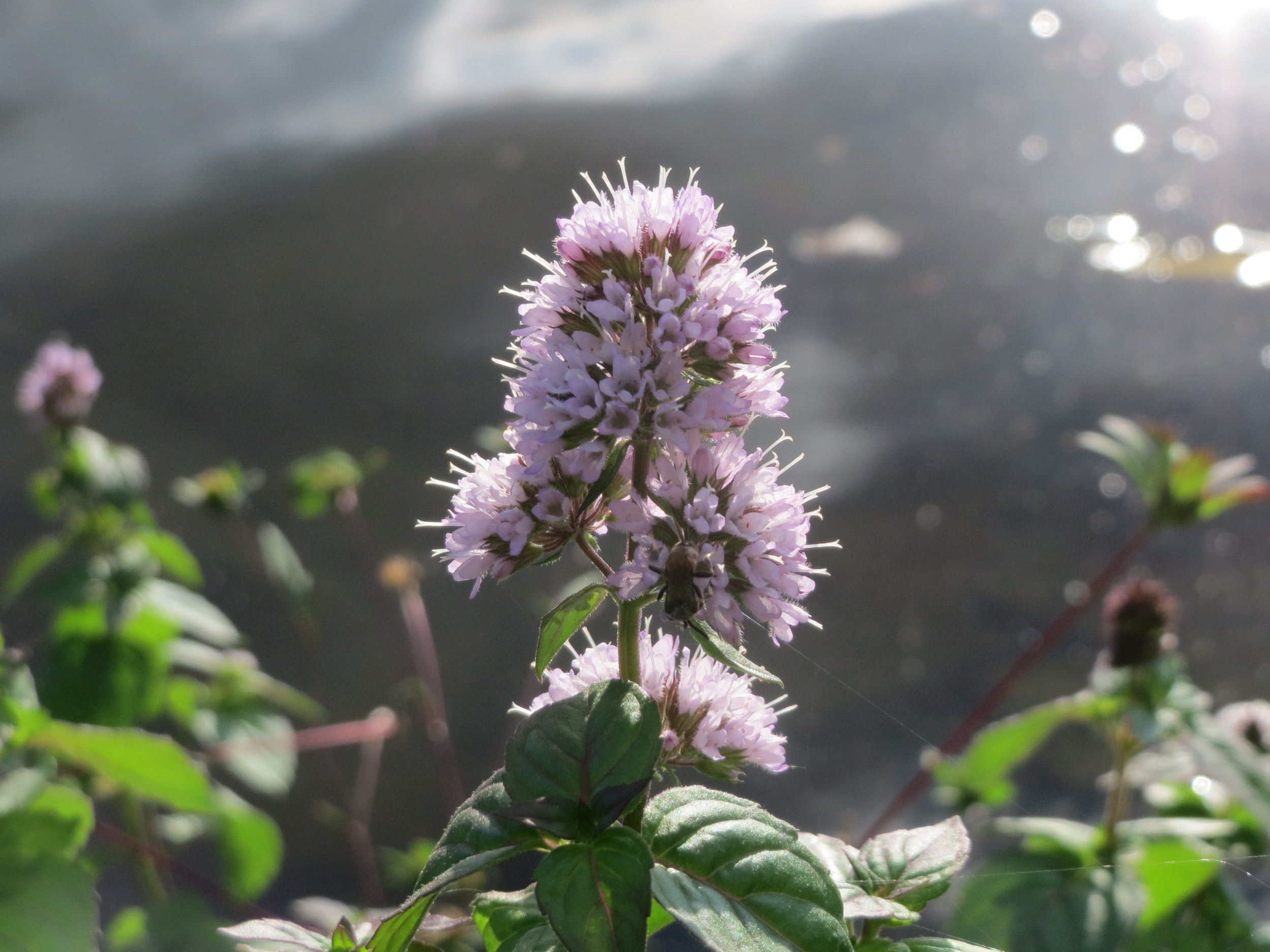 Wasserminze (Mentha aquatica) an der Saar in Saarbrücken